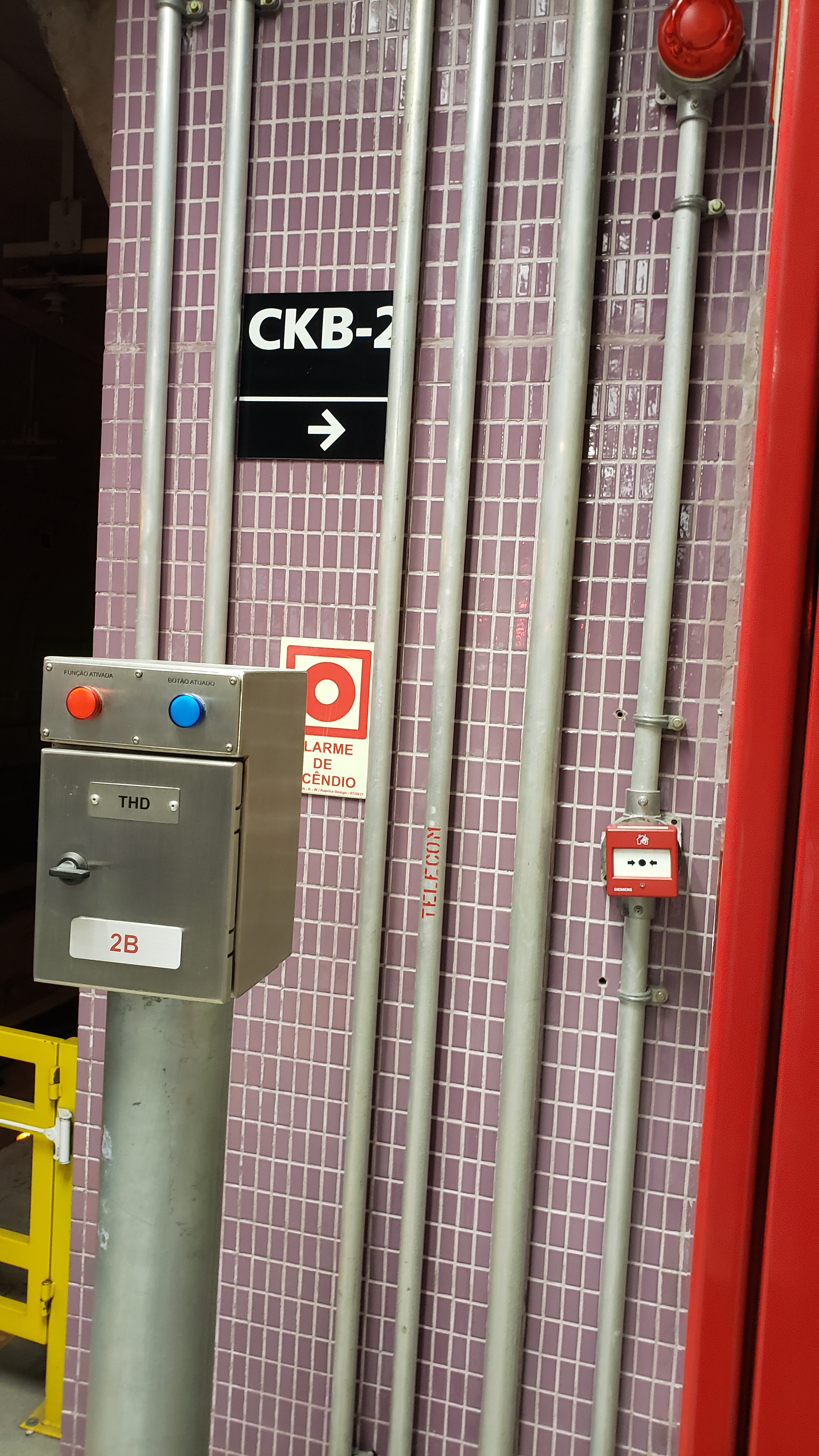 Fotografia da placa de identificação da estação Chácara Klabin da linha 5-lilás; podemos ver, além dos ladrilhos roxos, sistema de interrupção da circulação de trens de emergência e alarme de incêndio.